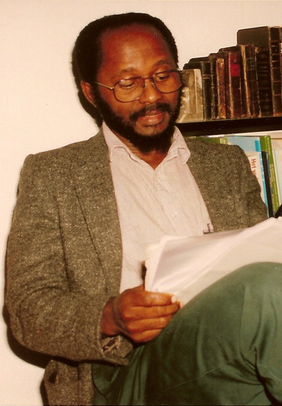 Andre Pakosie, Surinaams schrijver en kruidengeneeskundige. Eigen opname, ca. 1992.